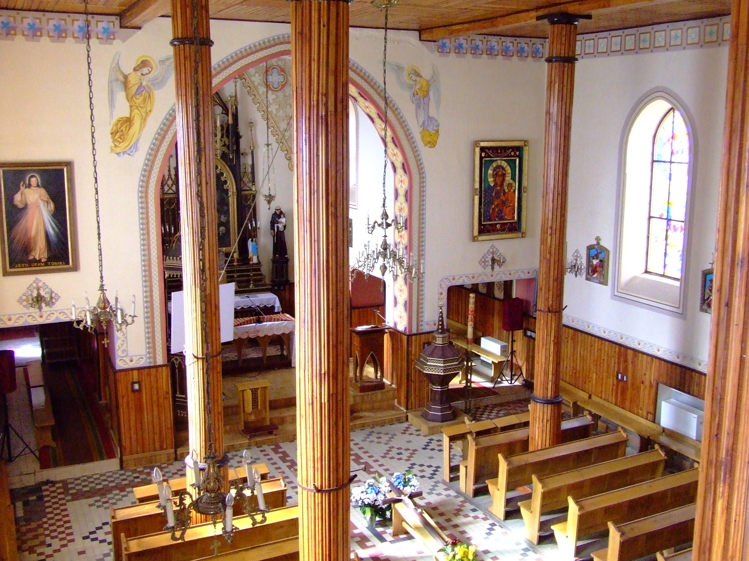 Szydłowo kościół